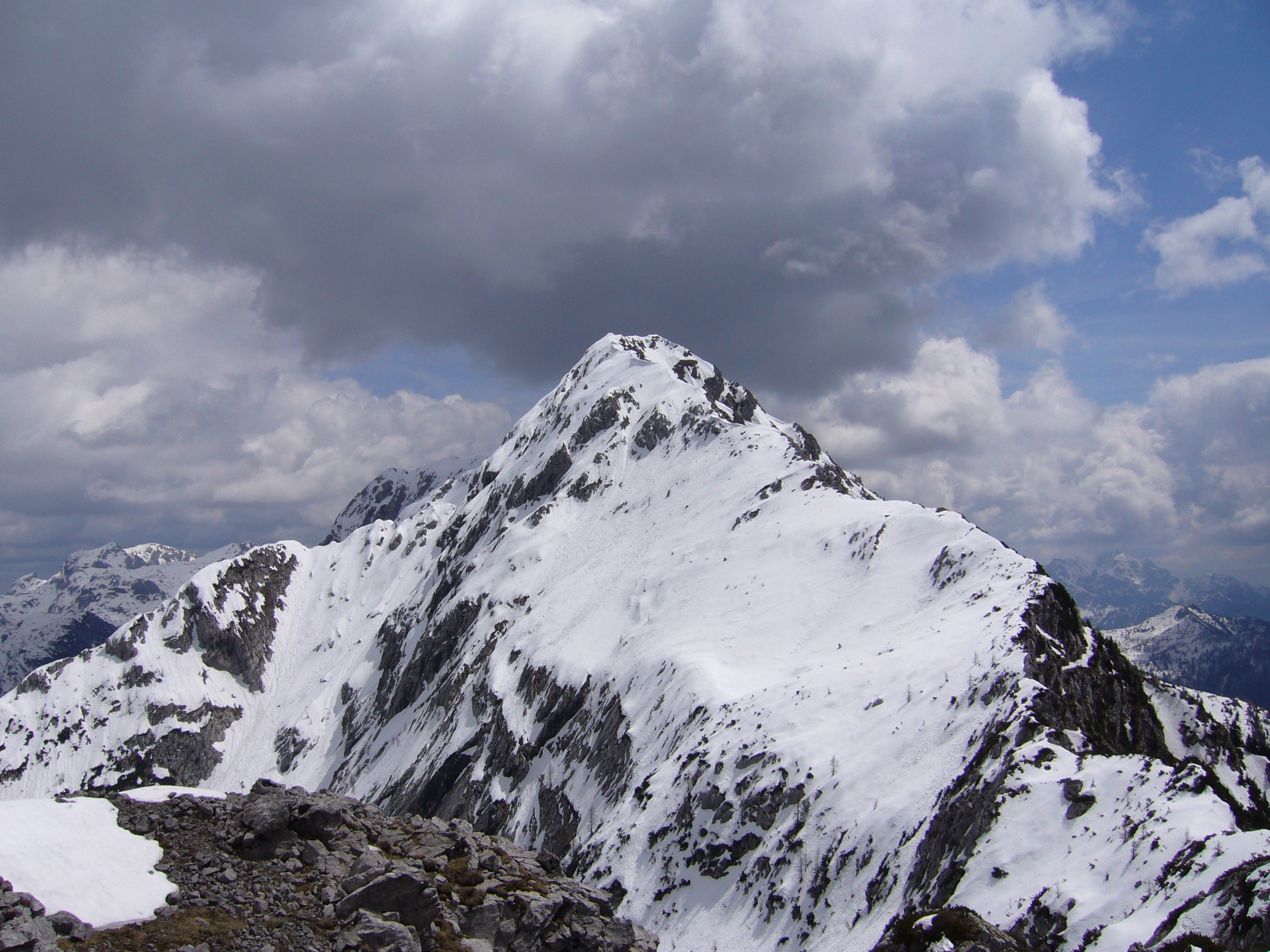 Mount Zermula (Paularo, Italy) from Cul di Creta